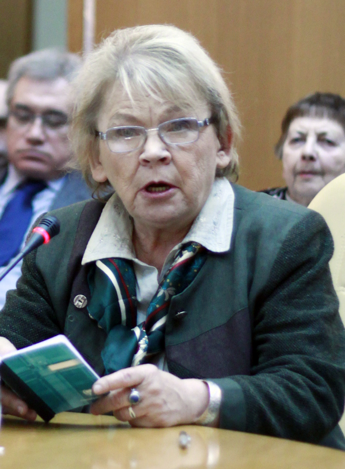 Marietta Chudakova, writer